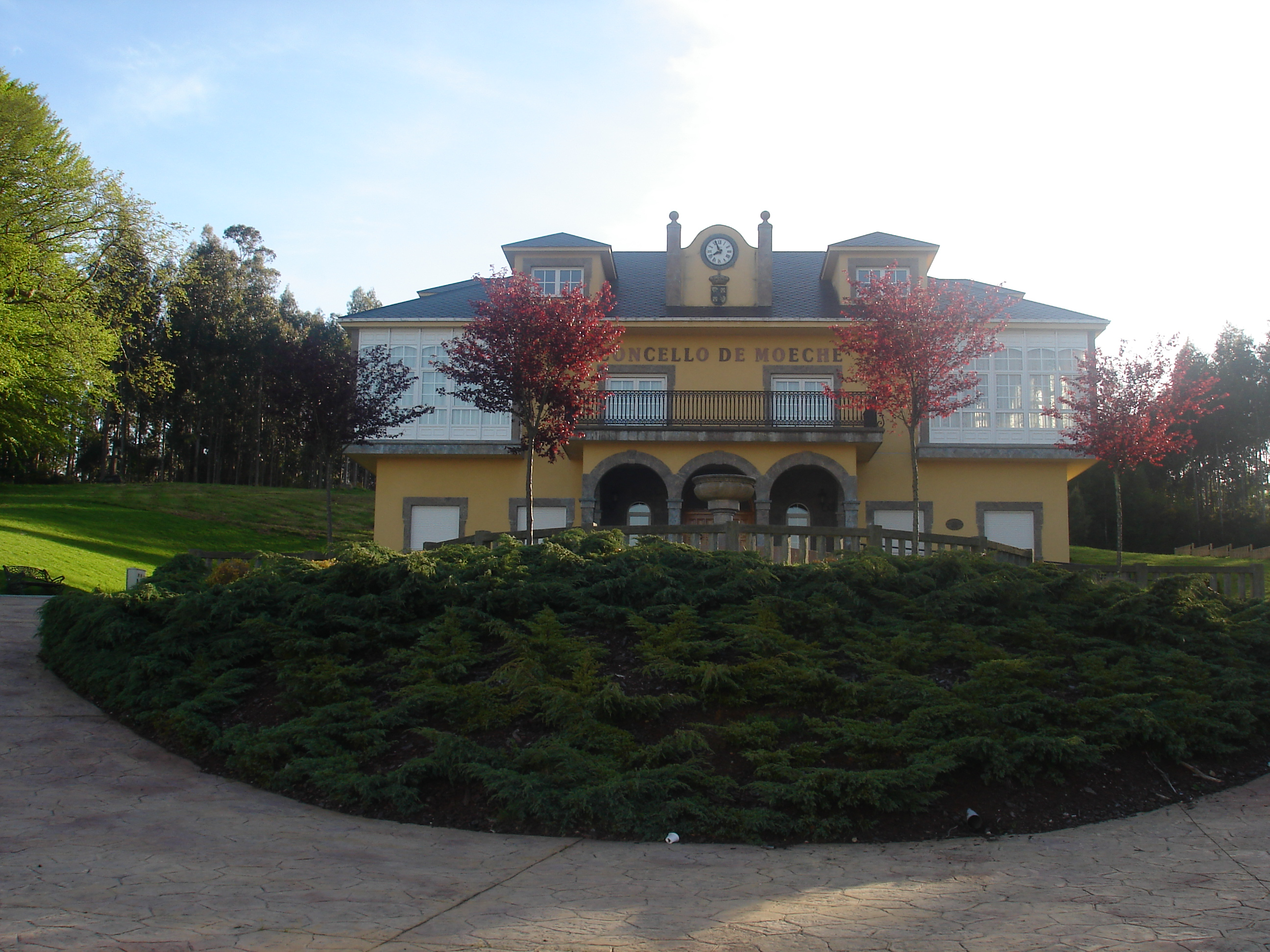 Casa do Concello de Moeche Categoría:Imaxes de Moeche